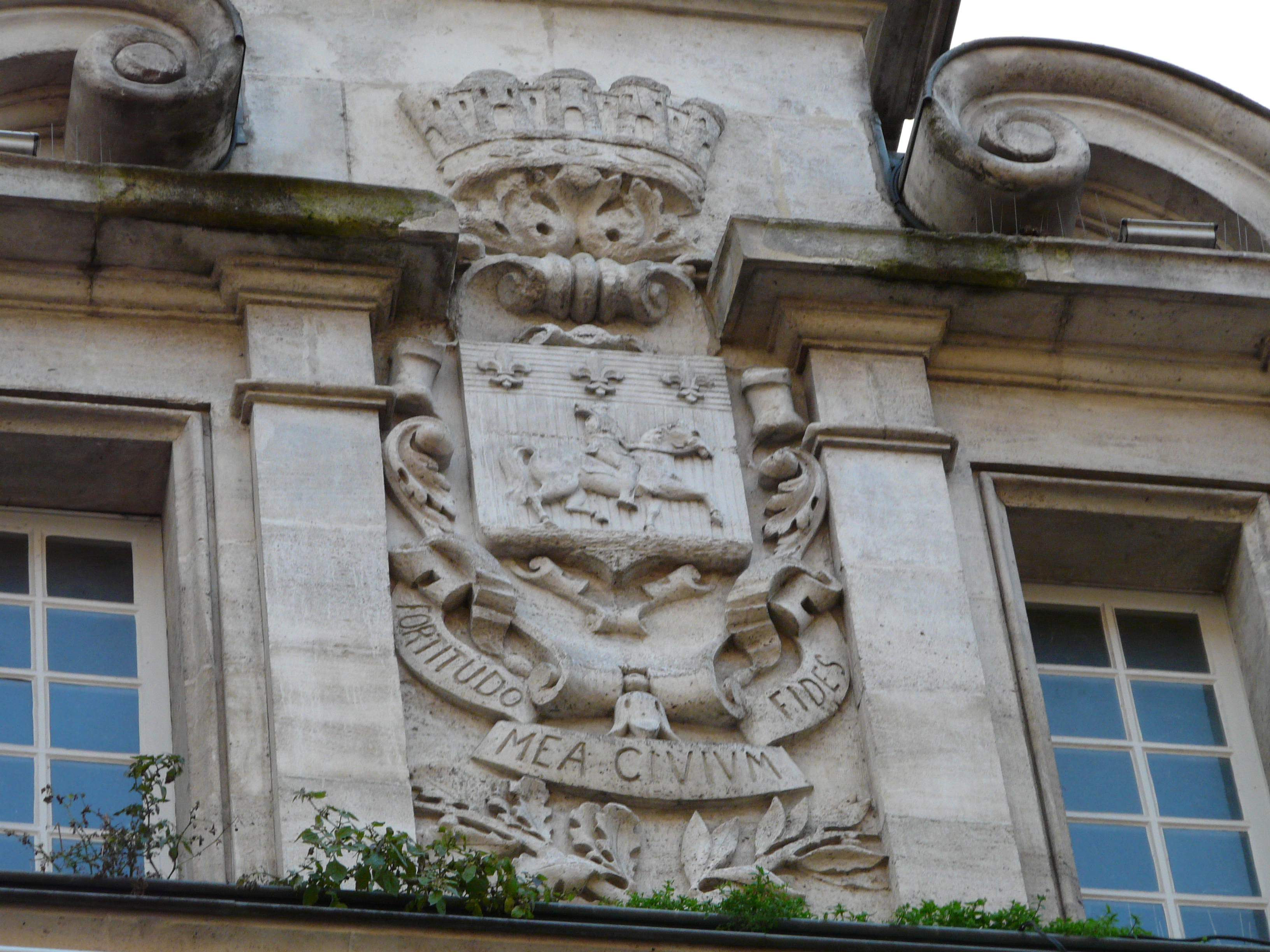 Armoiries sur la façade du couvent des Récollets, Cognac, Charente, France.